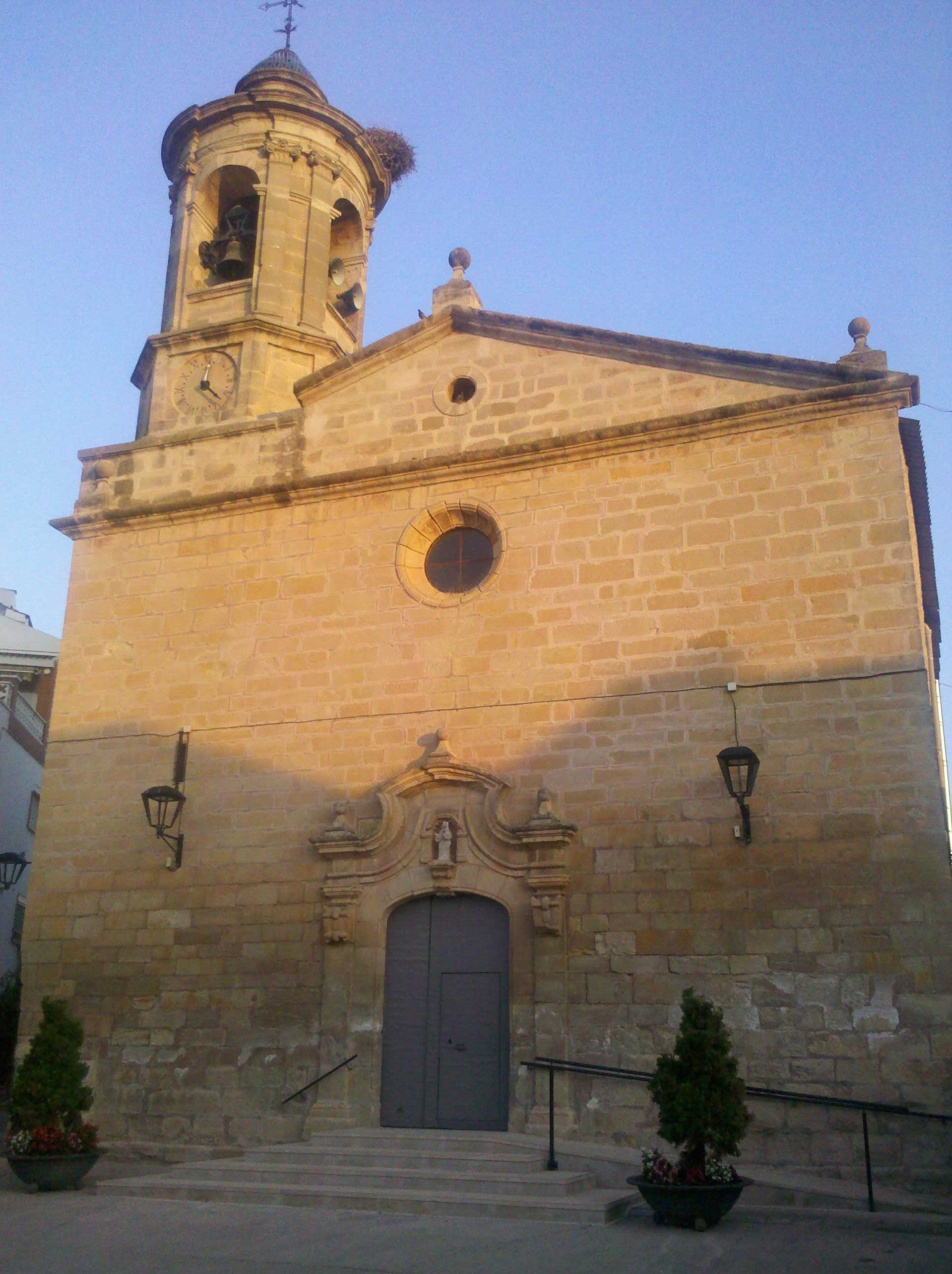 Església parroquial de la Nativitat de Maria (Montoliu de Lleida) This photo was uploaded with Wiki Loves Monuments mobile 1.2.1 (Android).